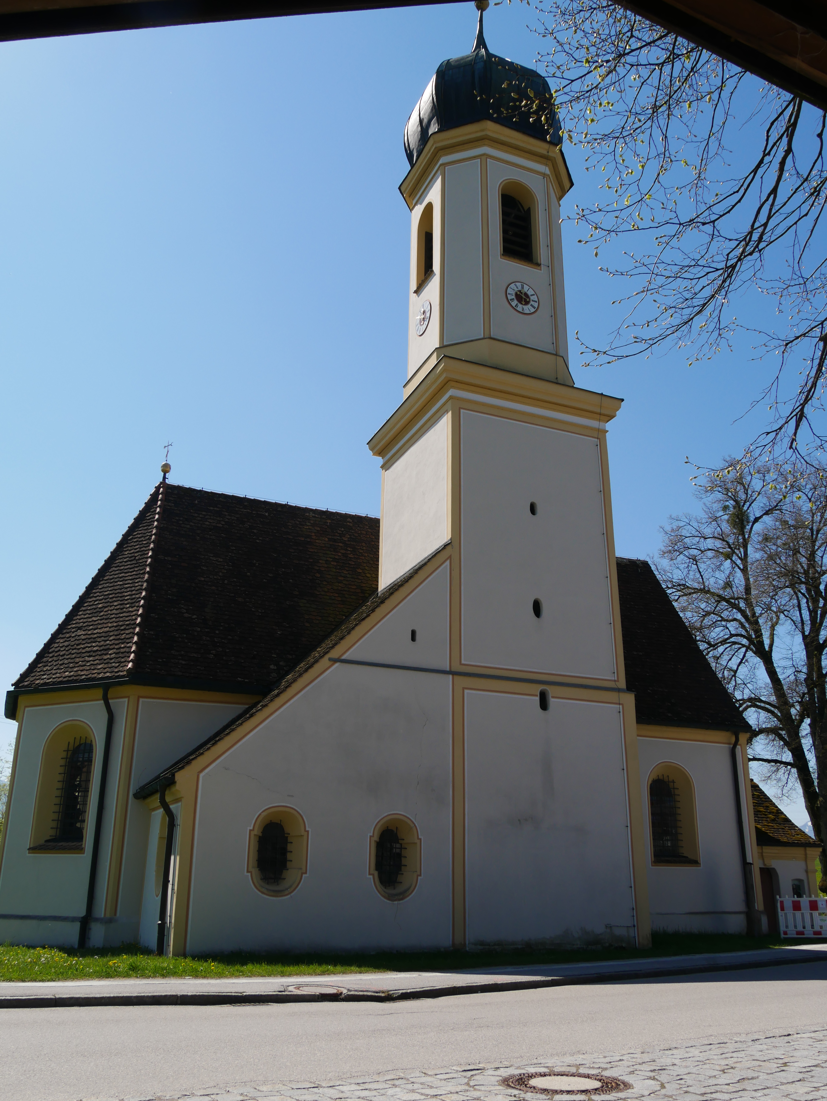 Murnau-Froschhausen, Riegseer Str.4, Kath. Filialkirche St. Leonhard: Ansicht von NO Murnau-Froschhausen, Riegseer Str.4, Kath. Filialkirche St. Leonhard: Ansicht von ONO